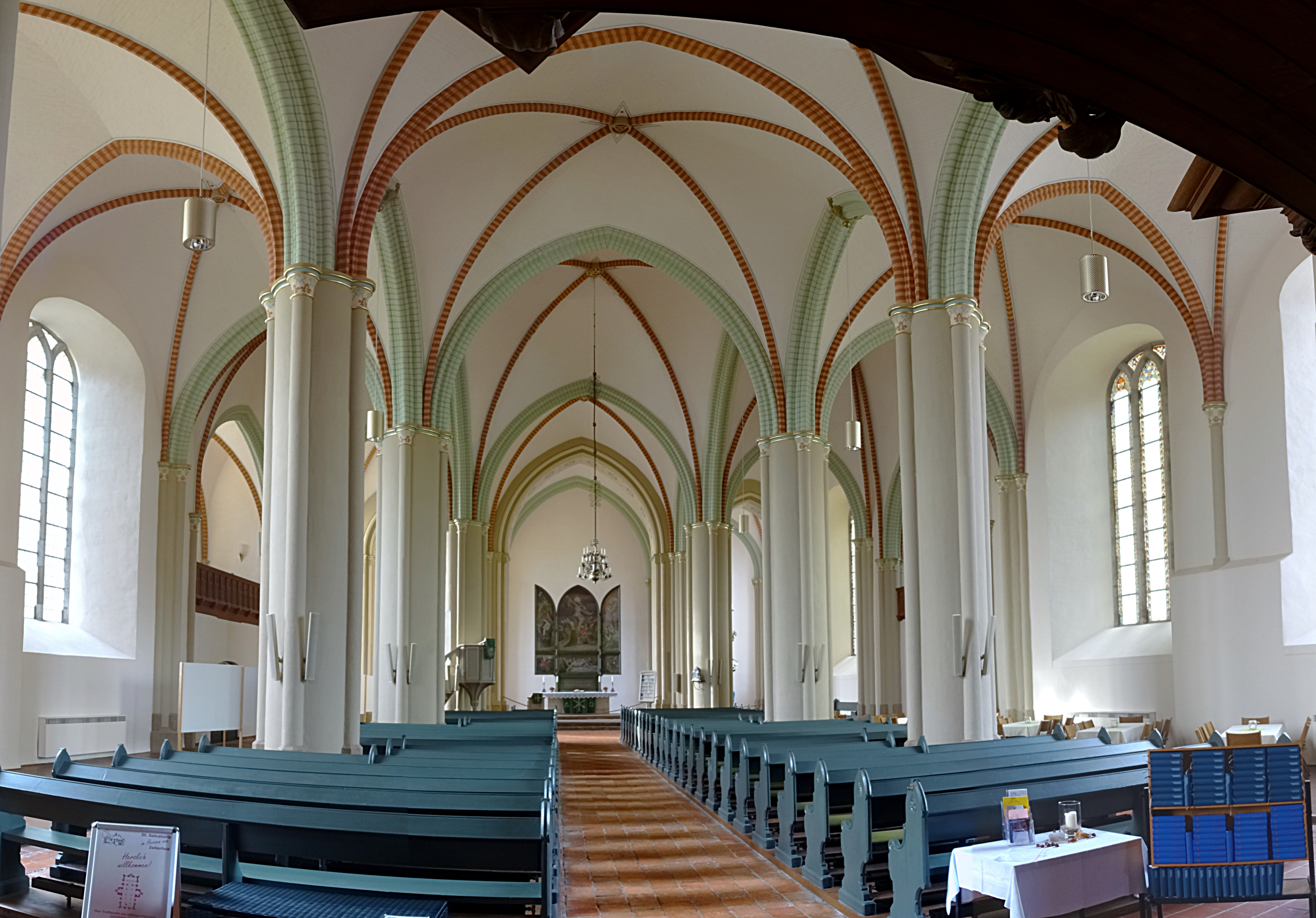 Innenraum Panorama der St. Salvatoris Kirche in Zellerfeld